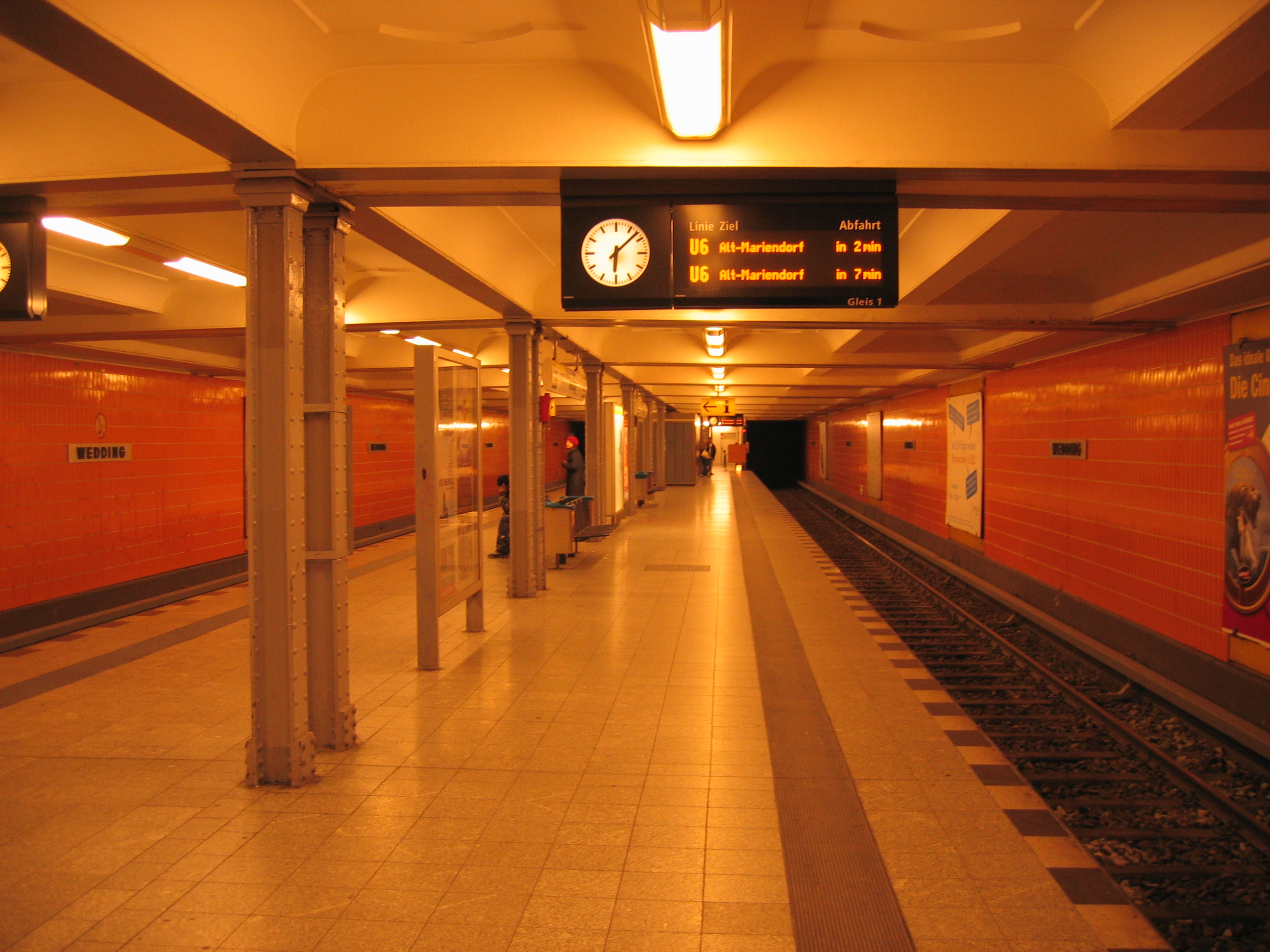 U-Bahnhof Wedding, Berlin